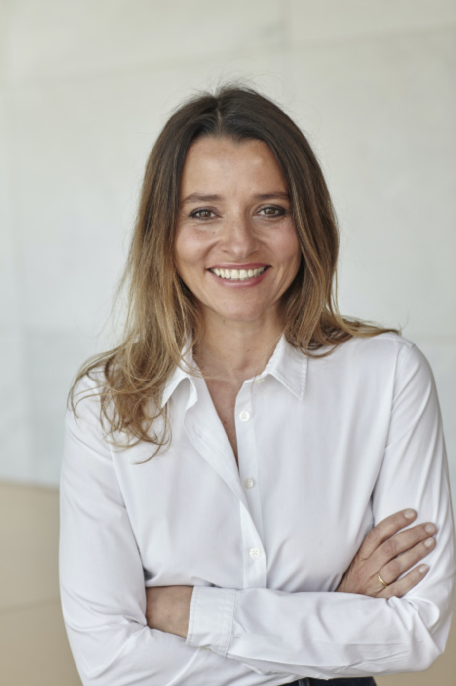 Portrait d'Anais Bouton